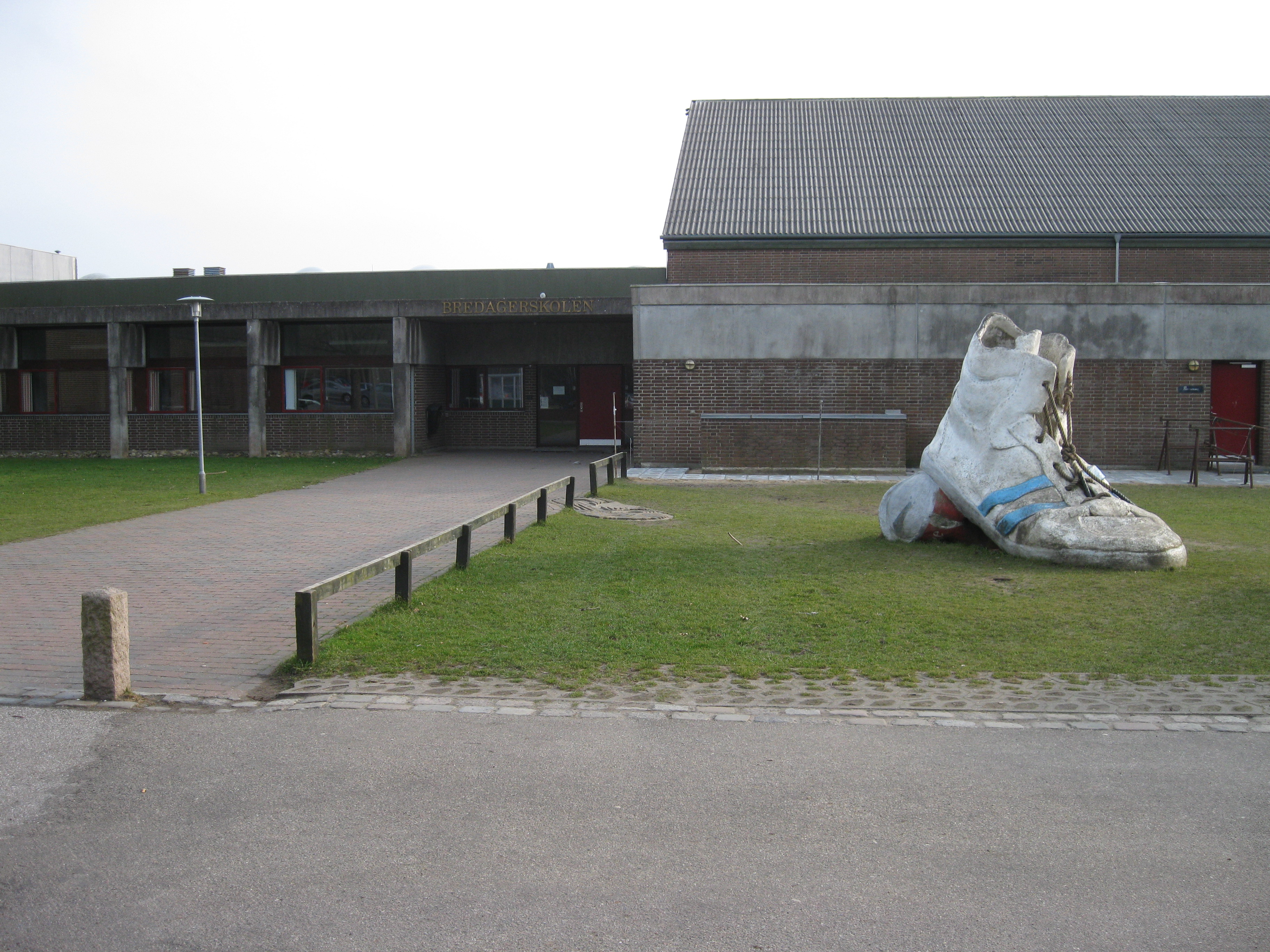 Bredagerskolen i Jelling